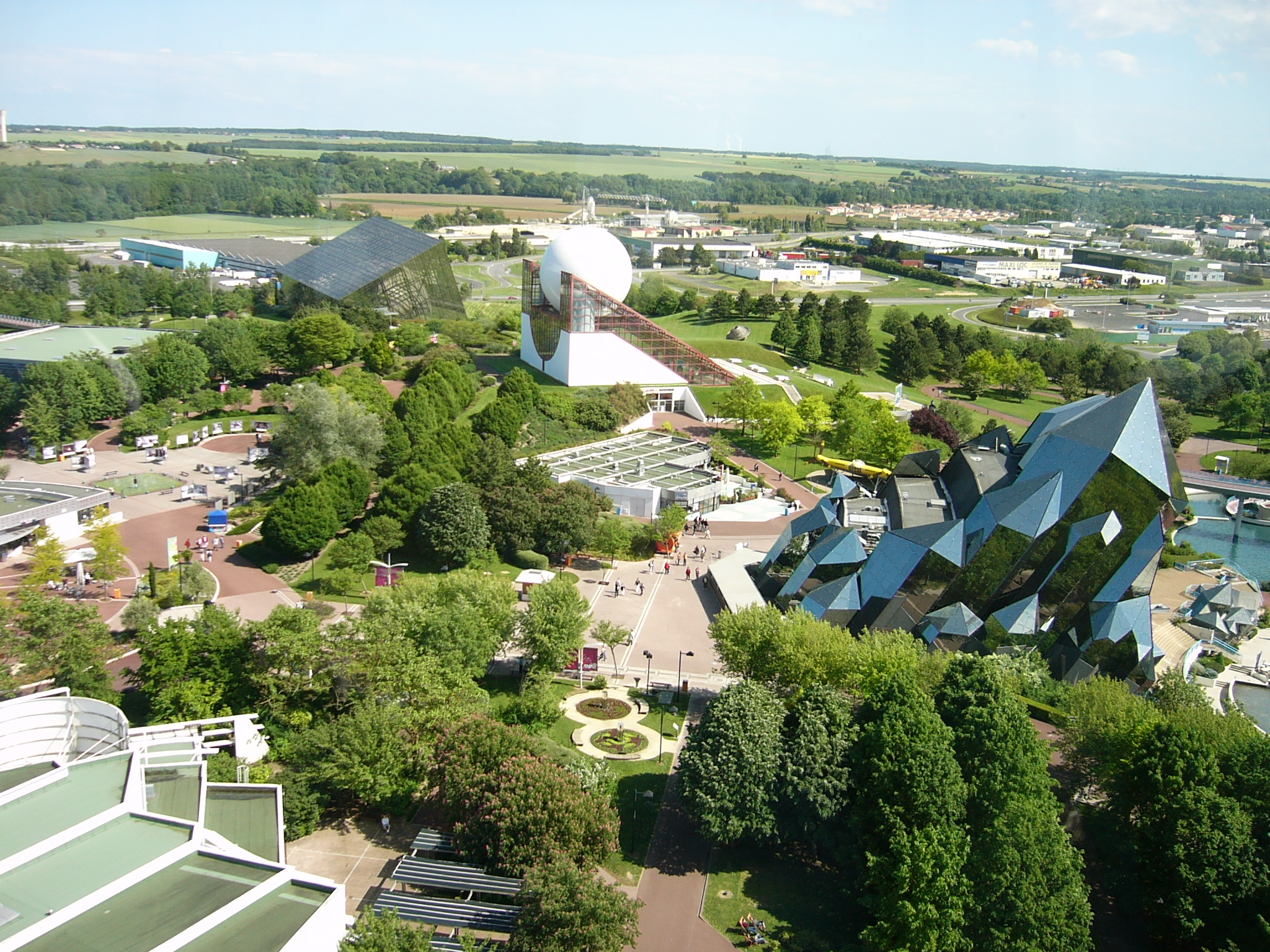 Le parc du futuroscope vu depuis la tour gyroscopique